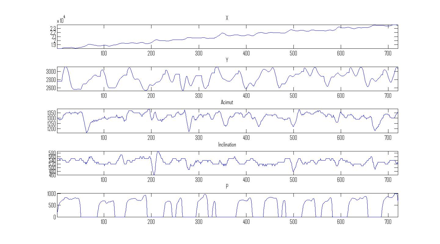 información dinámica números adquiridos intuos WACOM + MATLAB